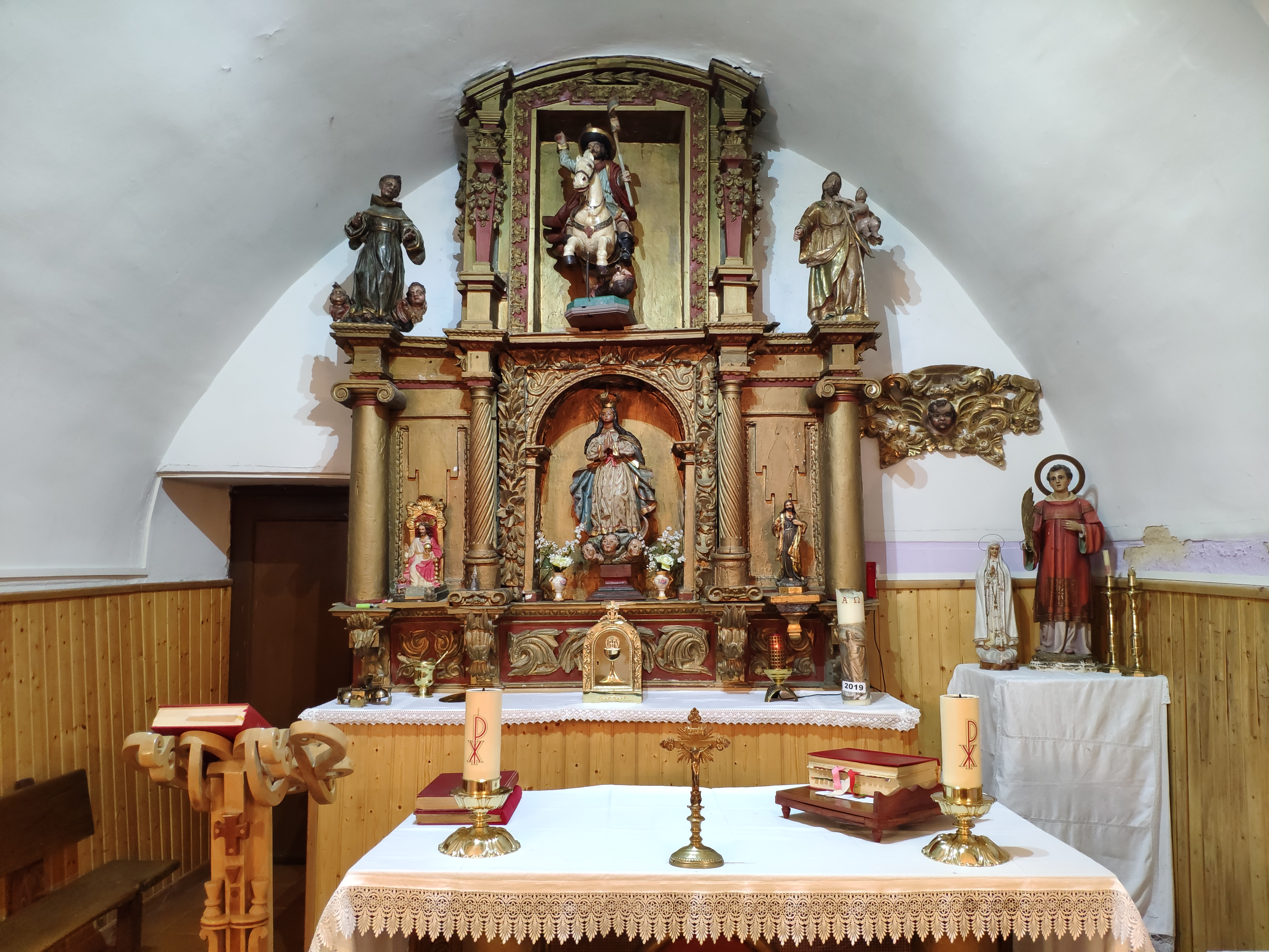 Altar de la iglesia de Oville con Santiago Apóstol como protagonista.